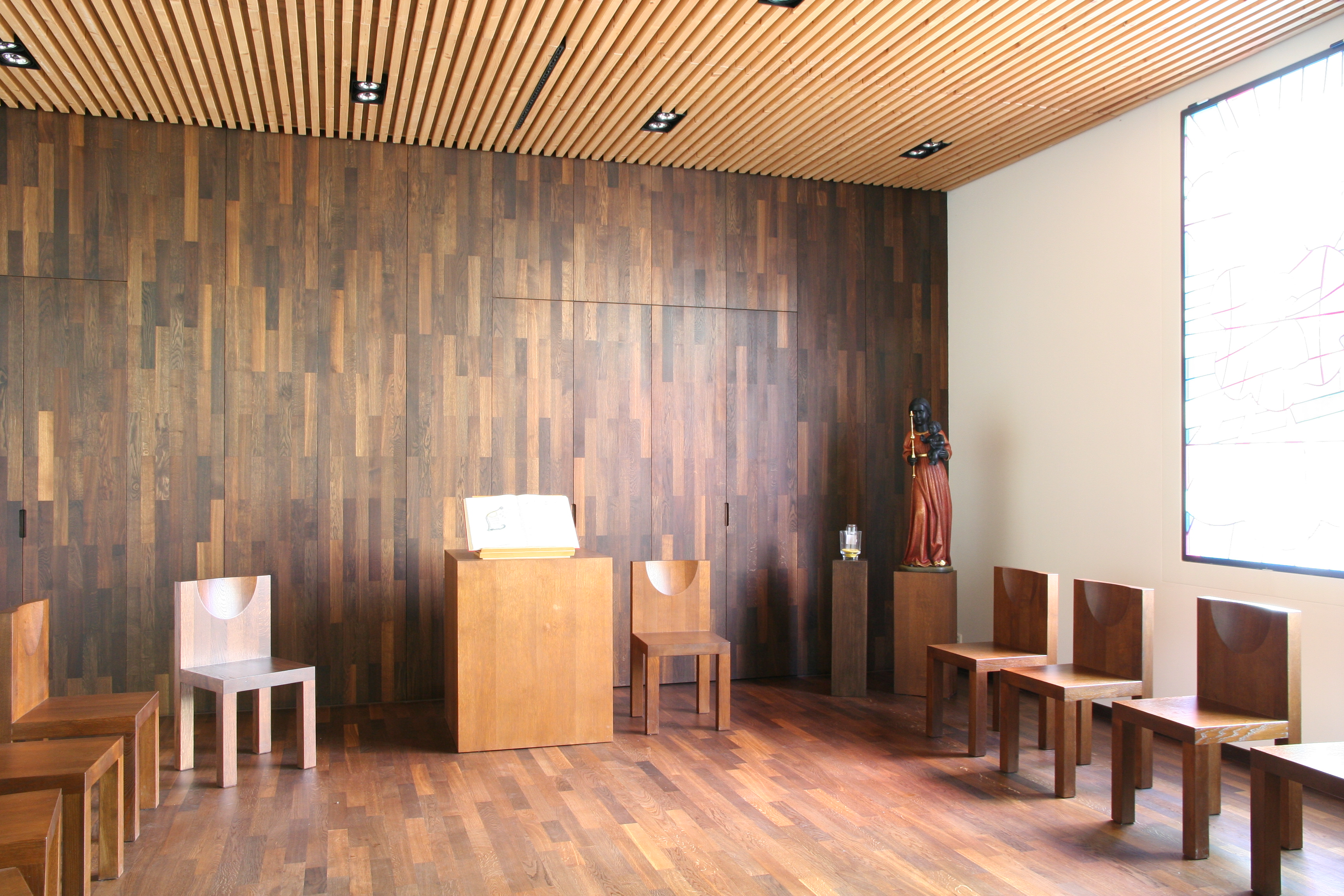 Römisch-katholische Pfarrkirche St. Josef Horgen, Raum der Stille